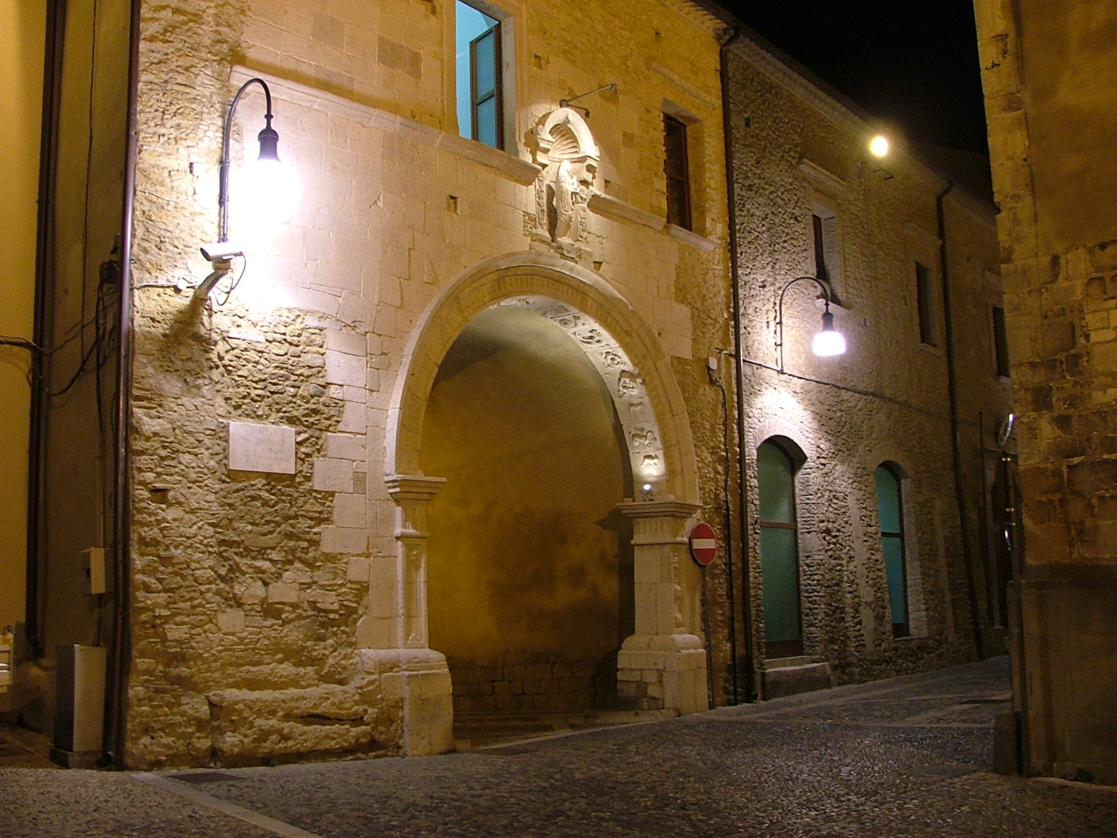 Foto Rocco STASI, Arco di re Ladislao, notturno Foto in pubblico dominio fatta da me